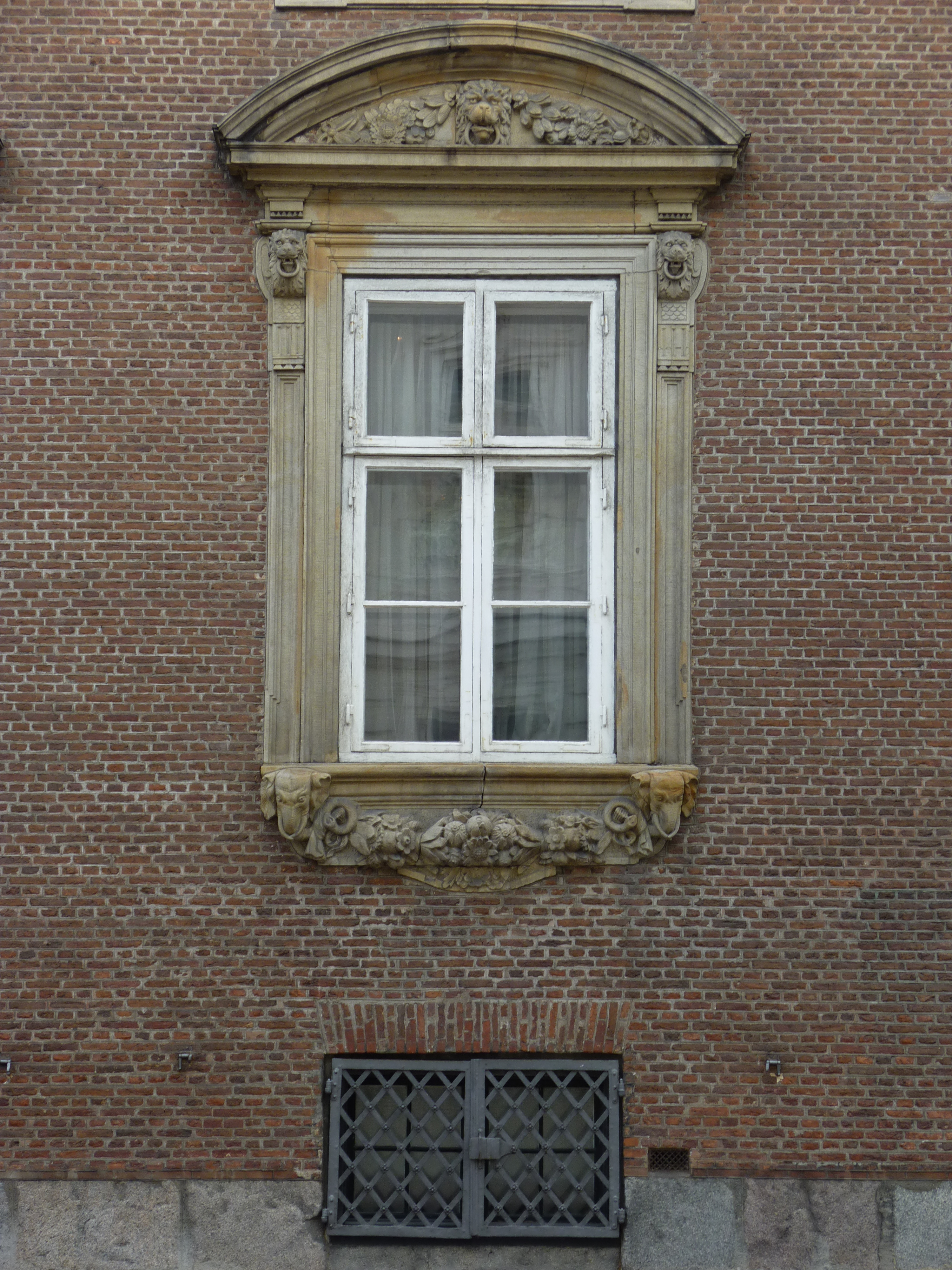 Window detail of Moltkes Palæ )Moltke Mansion) in Copenhagen, Denmark